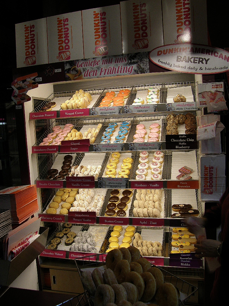 Donutauswahl in Berlin